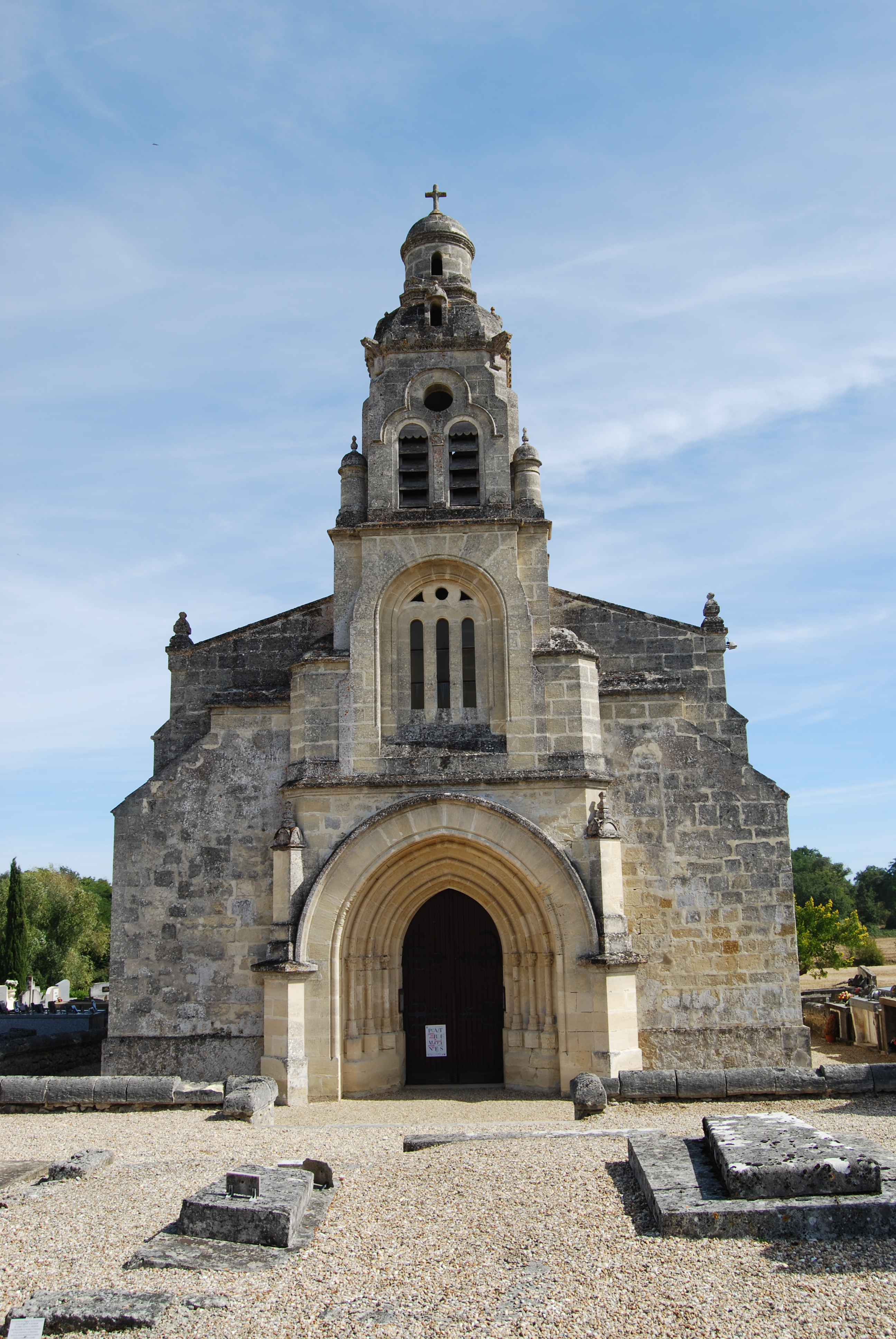 Église Saint-Christophe de Baron, (Classé, 1908) .